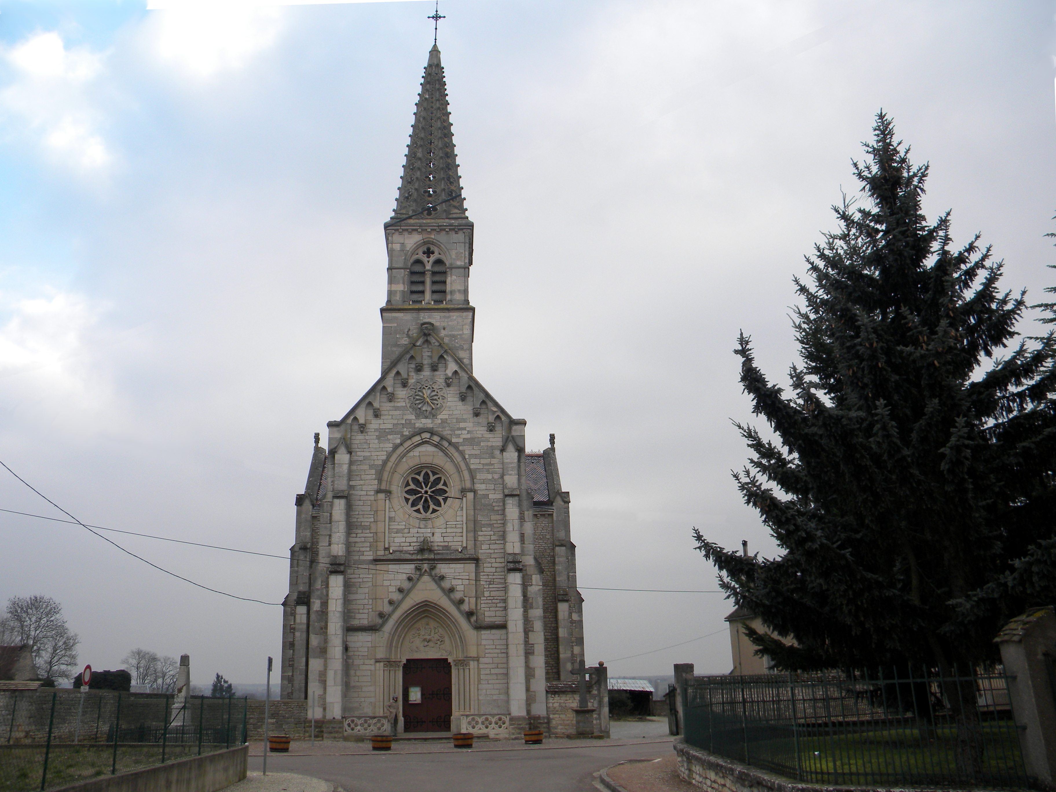 Kirko de Corpeay